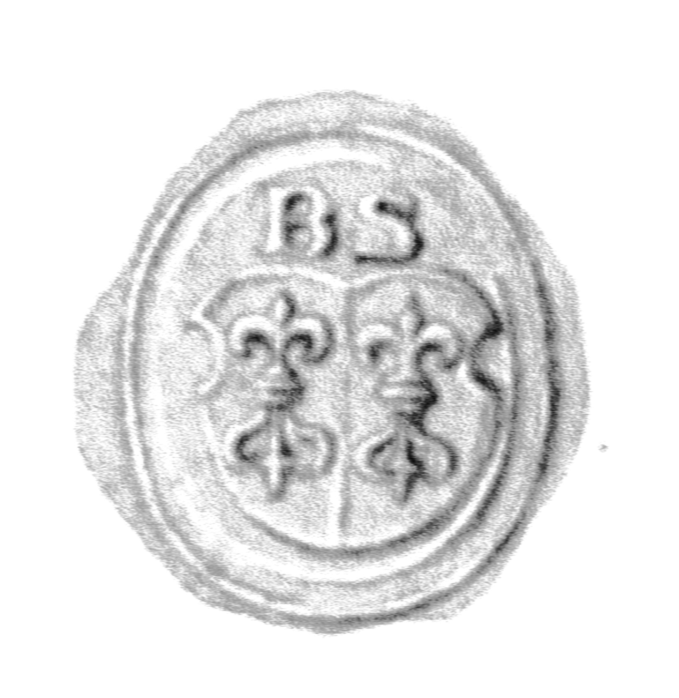 Siegel des Ratsmannes Benedictus Slieker (Slyker). Das Siegel stammt aus der Zeit um 1553. Siehe Emil Ferdinand Fehling: Lübeckische Ratslinie, Nr. 665 (Benedikt Schlicker).